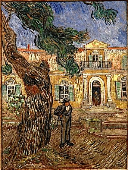 Hospital in Saint Remy, 58.0 x 45.0 cm. F_653, JH_1840 Musée d'Orsay